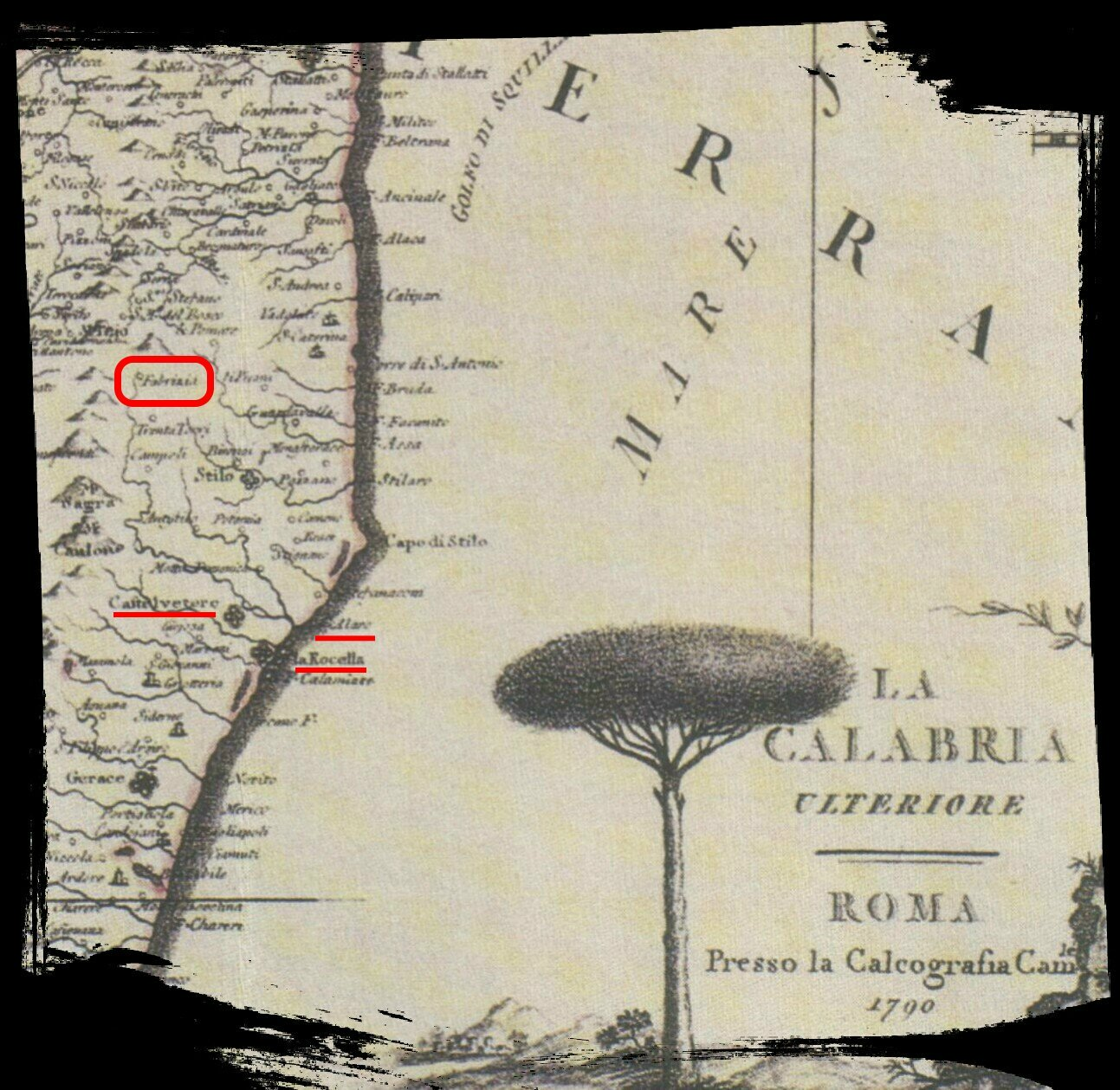 Rielaborazione personale della mappa scansionata da OrazioFilippelli. Autore: sconosciuto, Fonte: Calabria prima Italia, Editalia; Descrizione: Cartografia Calabria Ulteriore, 1790; Licenza d'uso: pubblico dominio; Note: scanner by user Oraziofilippelli